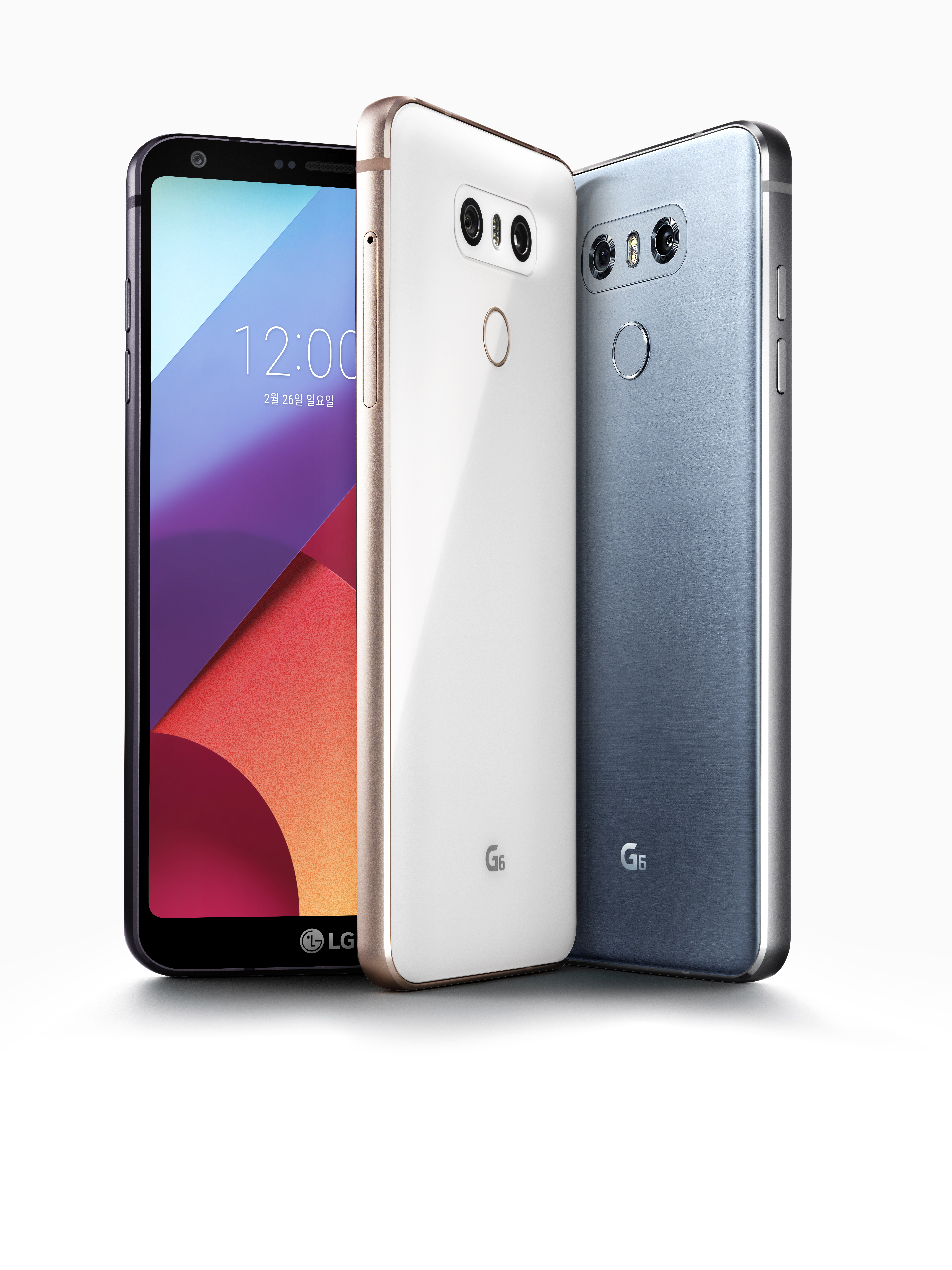 LG G6 제품사진